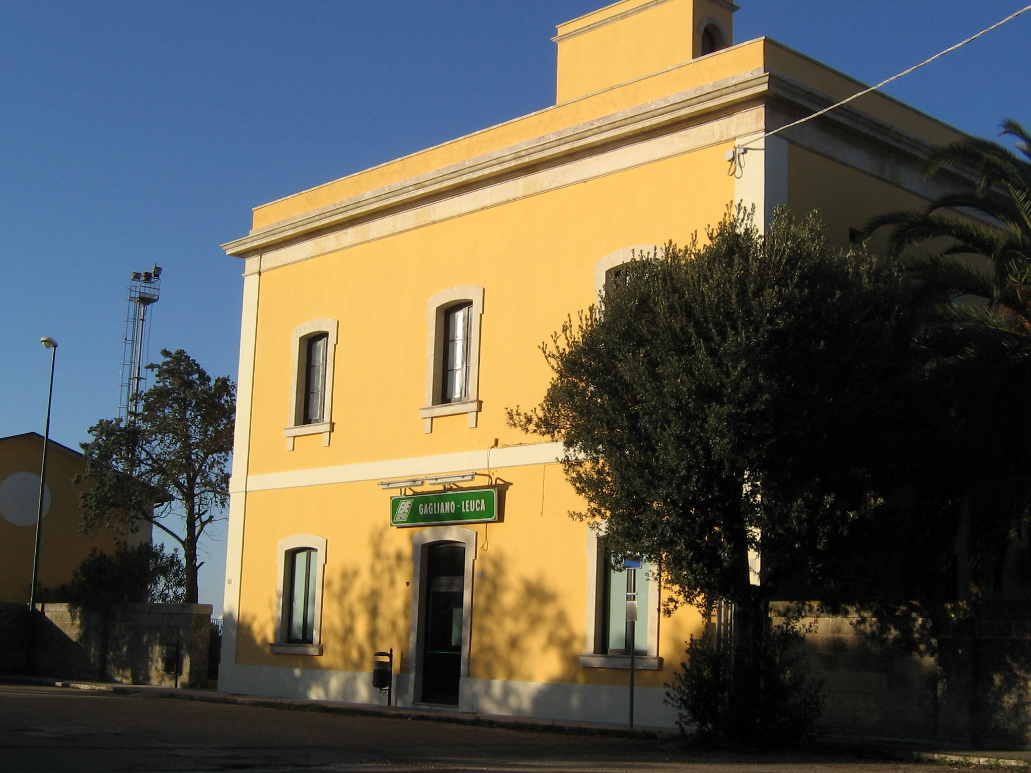 Facciata d'ingresso della stazione di Gagliano-Leuca